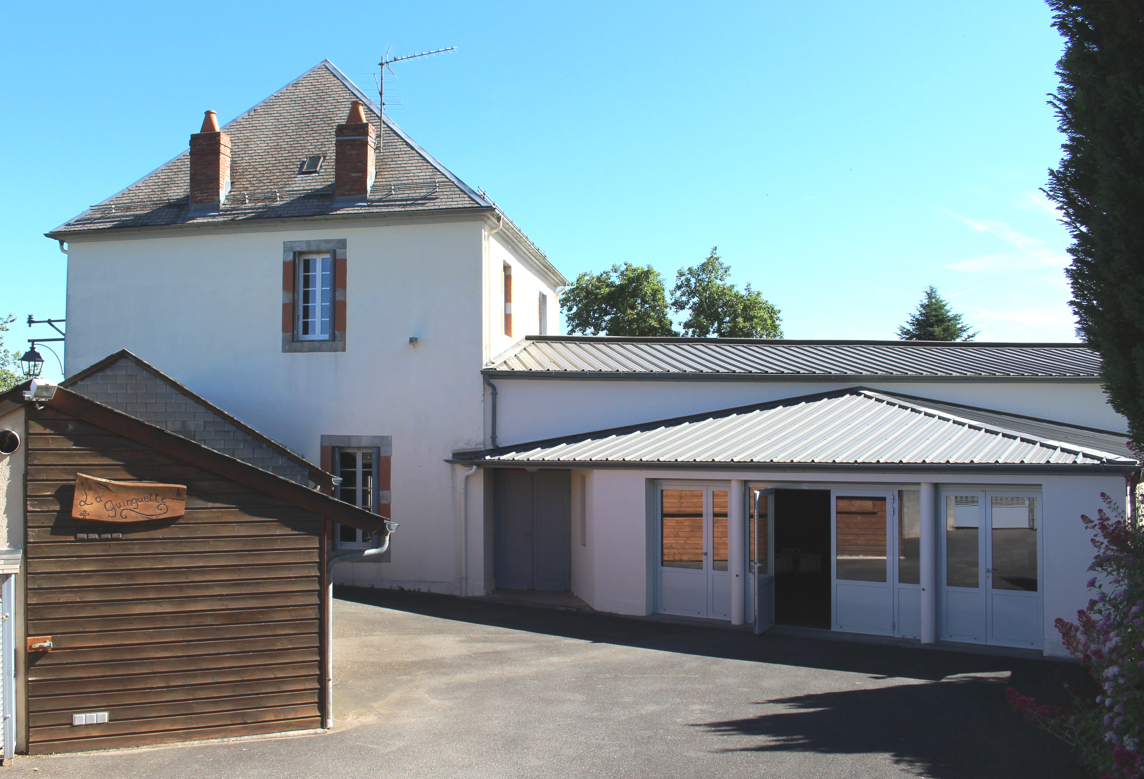 Salle des fêtes de Bettes (Hautes-Pyrénées)